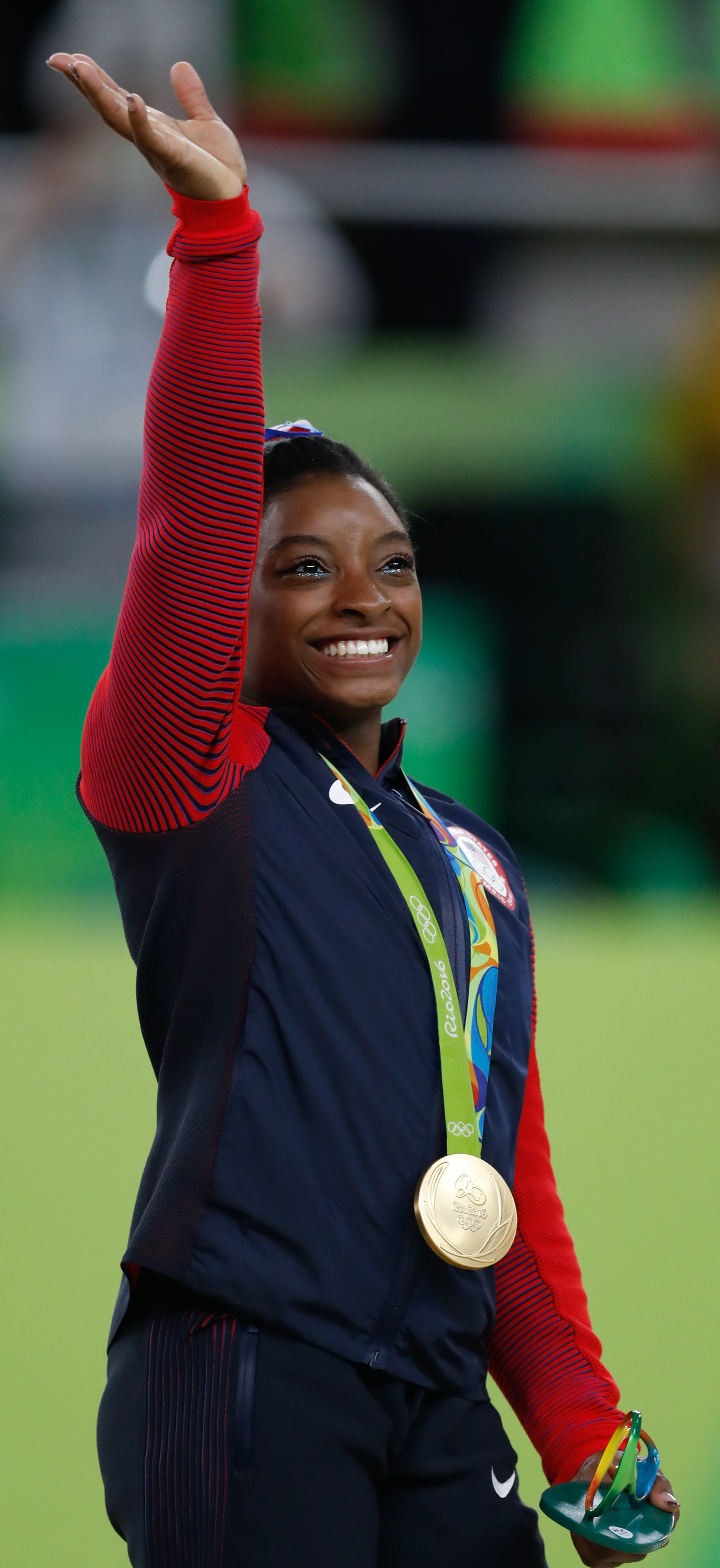 Rio de Janeiro - Simone Biles, ginasta dos Estados Unidos, durante final em que levou medalha de ouro na disputa por equipes feminina nos Jogos Olímpicos Rio 2016. (Fernando Frazão/Agência Brasil)